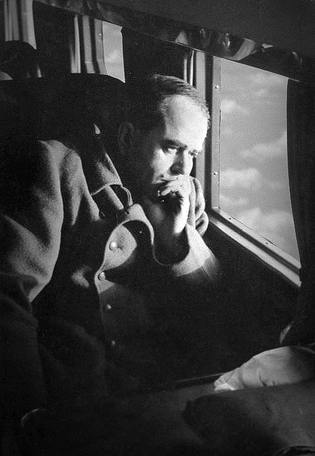 Albert Speer im Flugzeug ADN-Zentralbild / Atchiv Der Reichsminister für Rüstung und Kriegsproduktion Prof. Albert Speer auf einem Inspektionsflug 1943. Abgebildete Personen: Speer, Albert Prof. Dr.: Reichsminister für Rüstung und Kriegsproduktion, Architekt, Deutschland (PND 118615998)